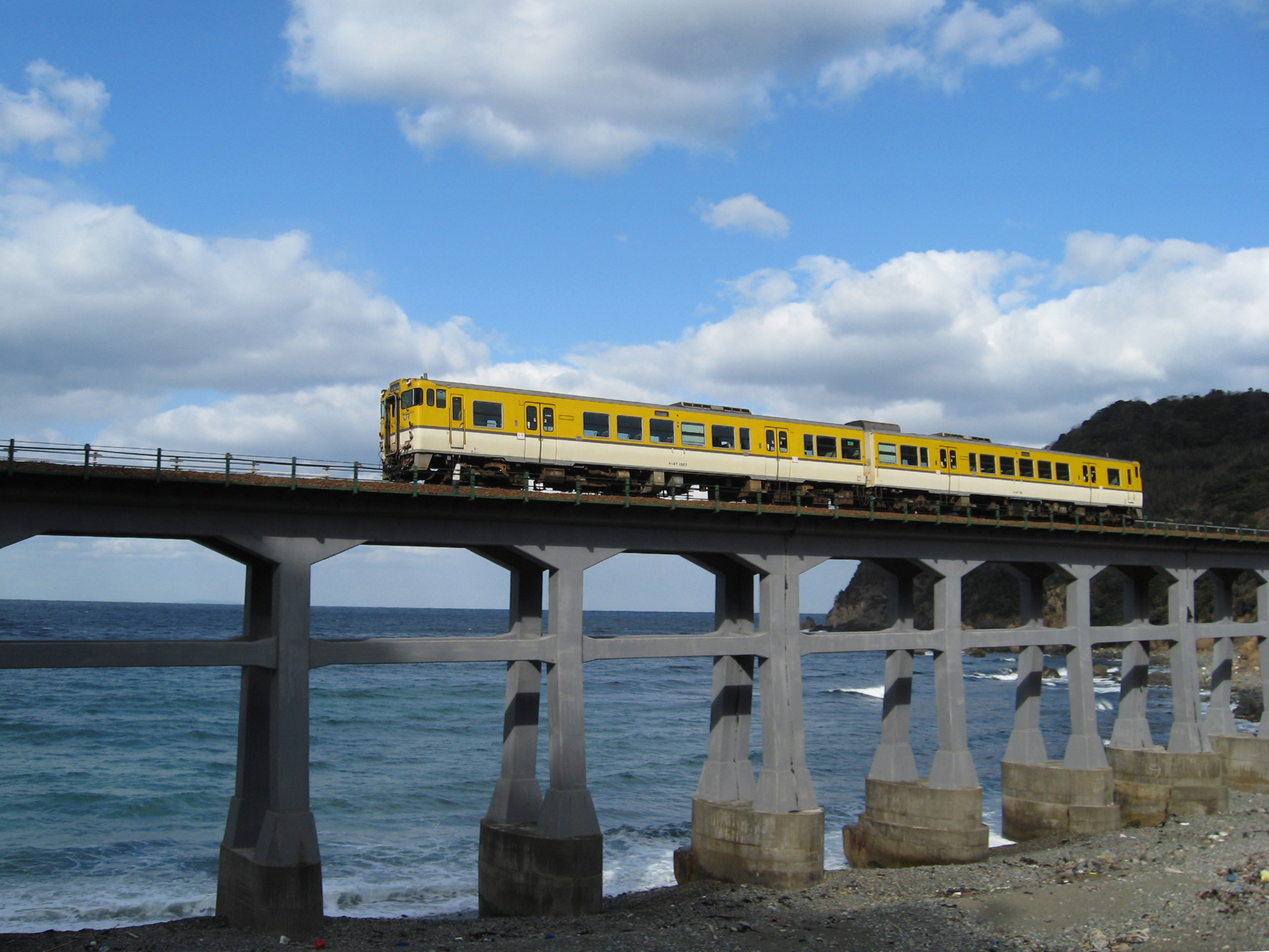 2010/02/06撮影 山陰本線1569D